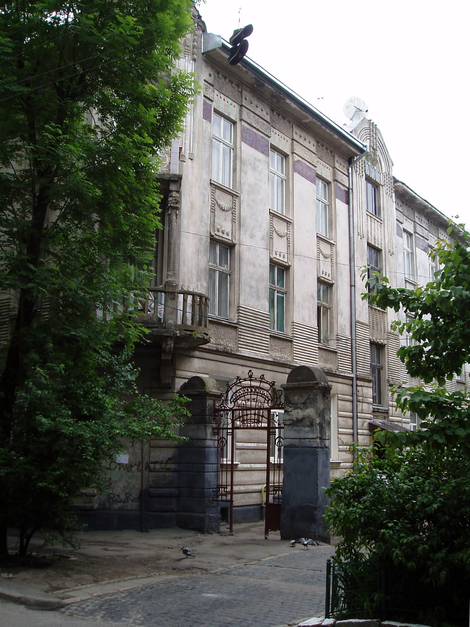 Будинок № 10 на вулиці Донцова у Львові